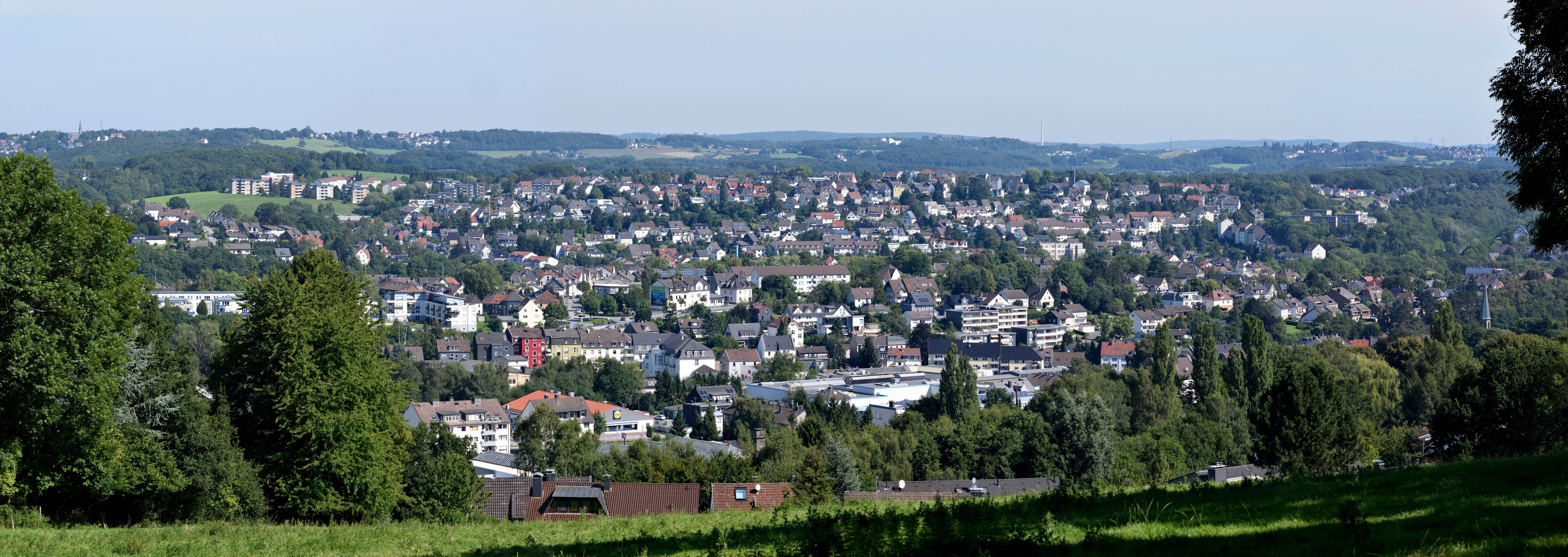 Panorama Aufnahme von Gevelsberg, Aufnahmestandort Elberfelder Straße Nähe Stütingstraße, Blickrichtung nach Norden